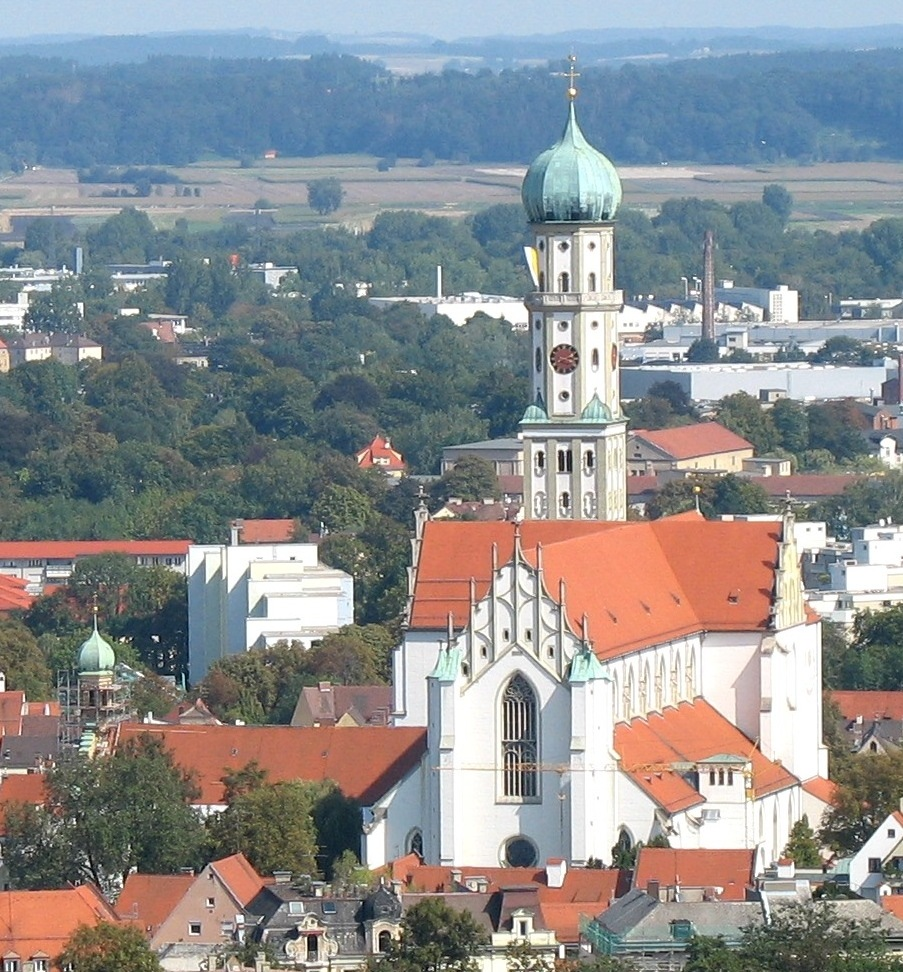 St. Ulrich und Afra, Augsburg